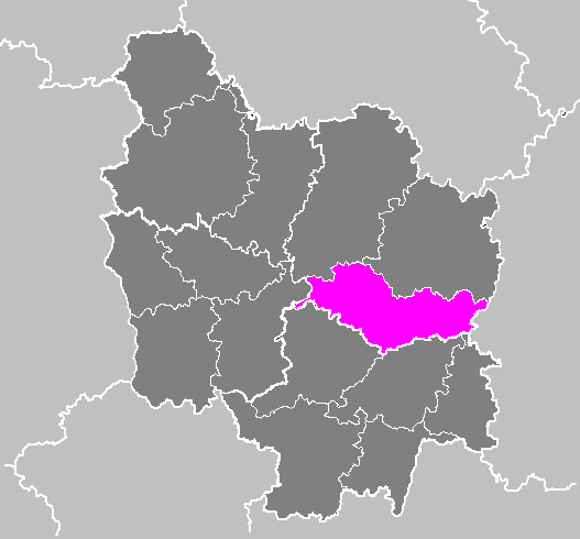 Maps of arrondissements and cantons of France: Arrondissement de Beaune.PNG (Région Bourgogne)